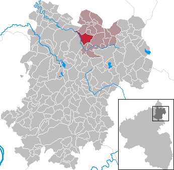 Unnau in Rhineland-Palatinate - Westerwaldkreis